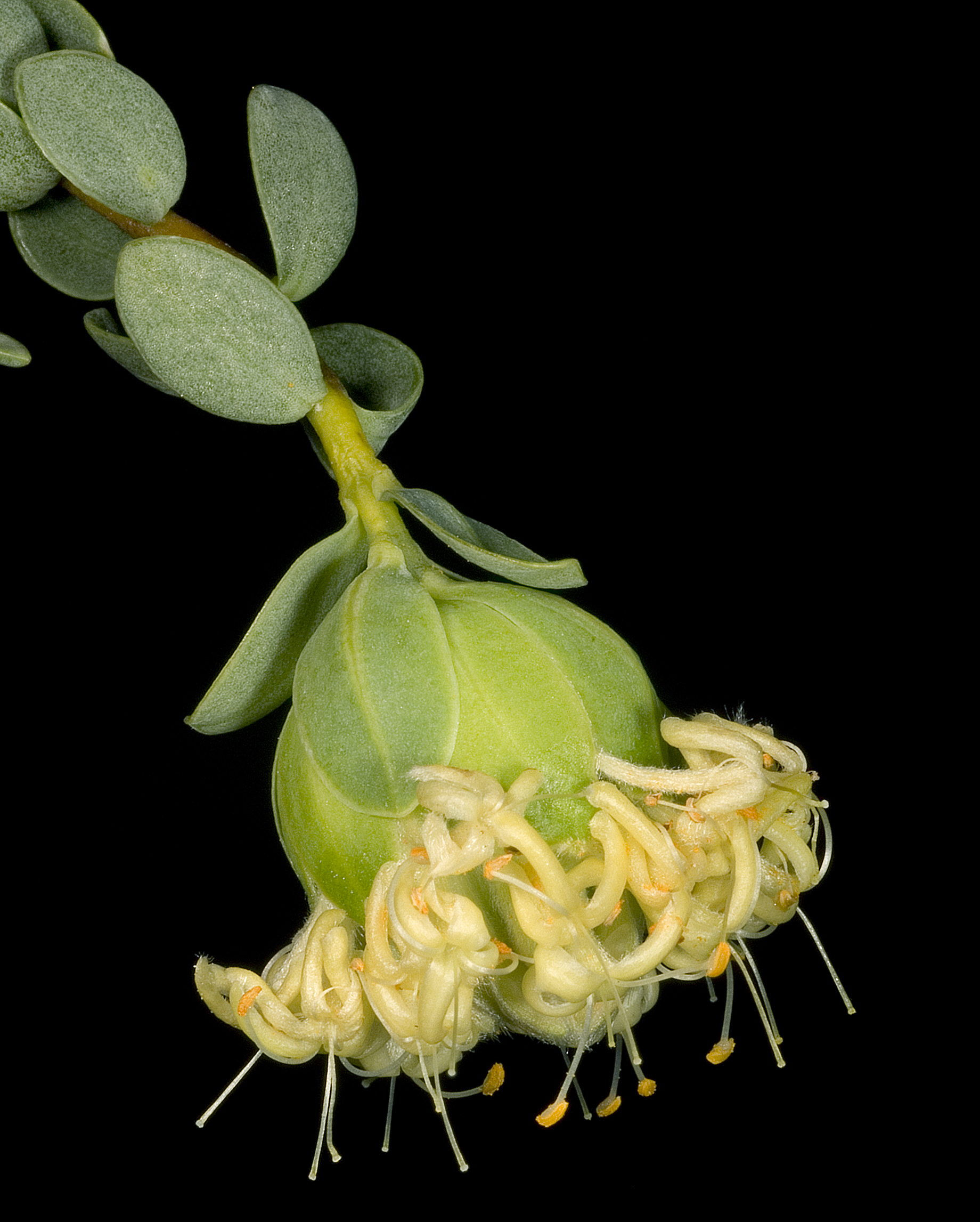 KRT3876